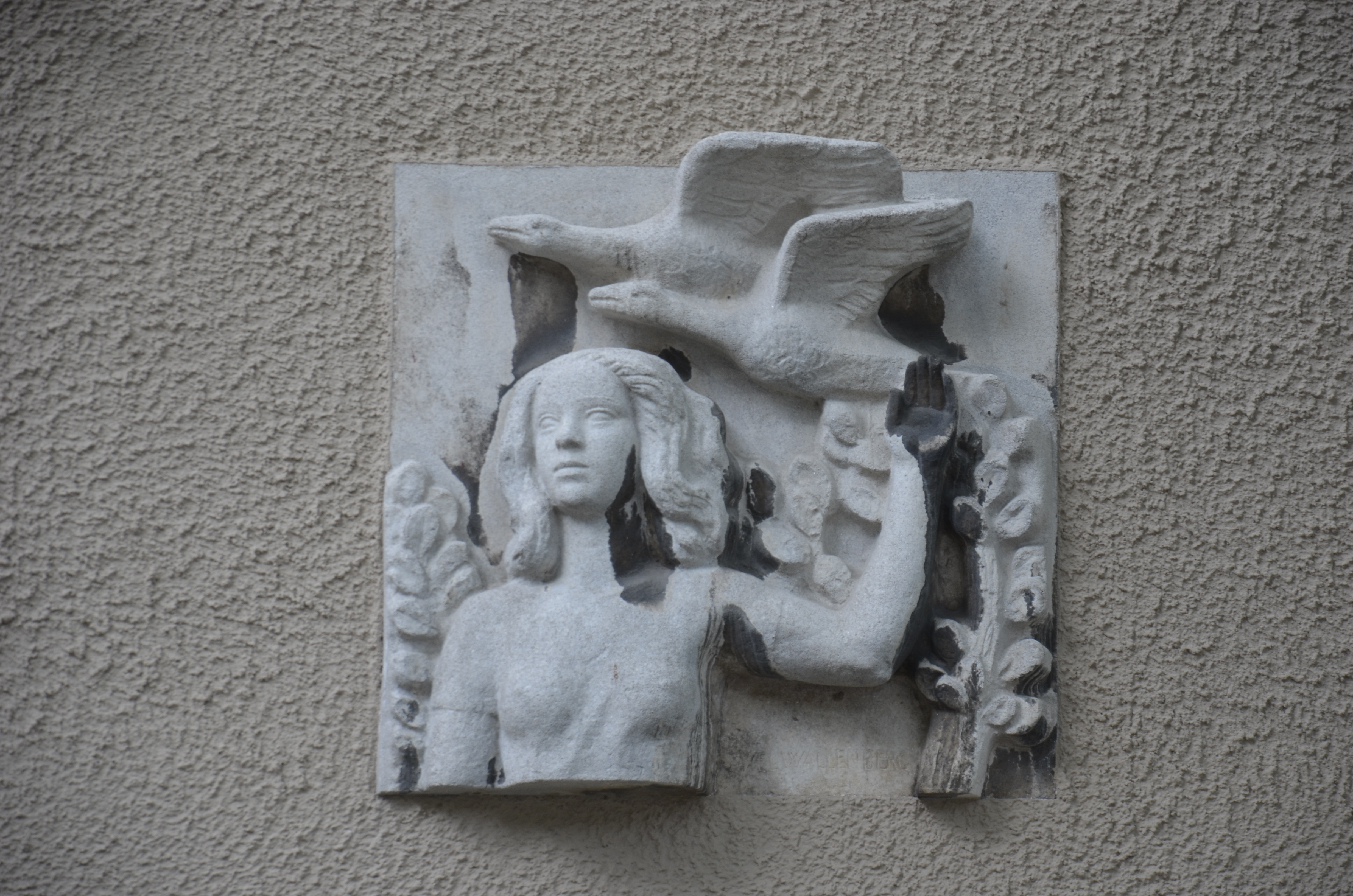 Axel Wallenberg: Flicka med träd och armar, konststen,1948, fasaden till Gröndalsvägen 136 i Stockholm